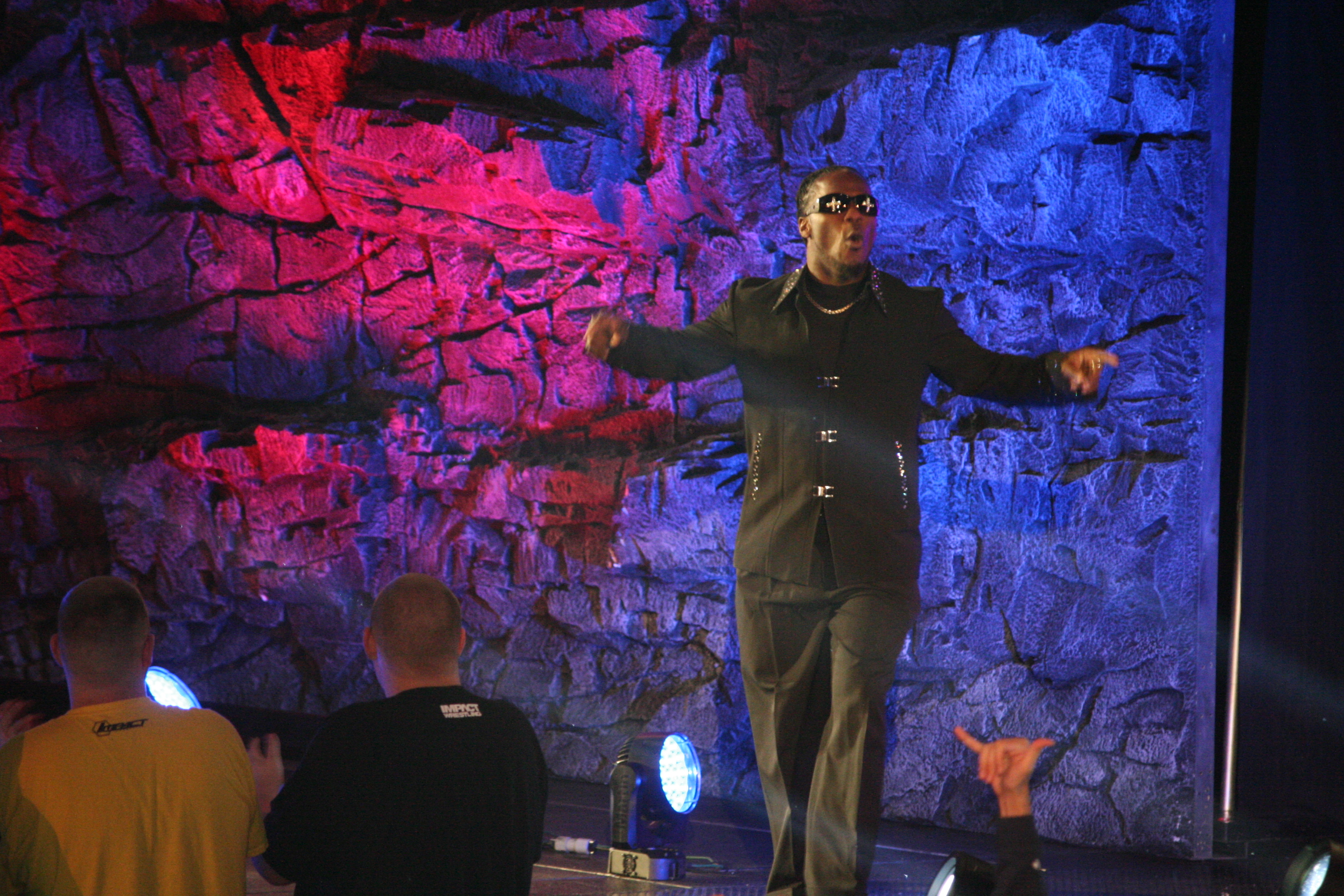 D'Angelo Dinero faisant son entrée lors de Bond for Glory 2015.